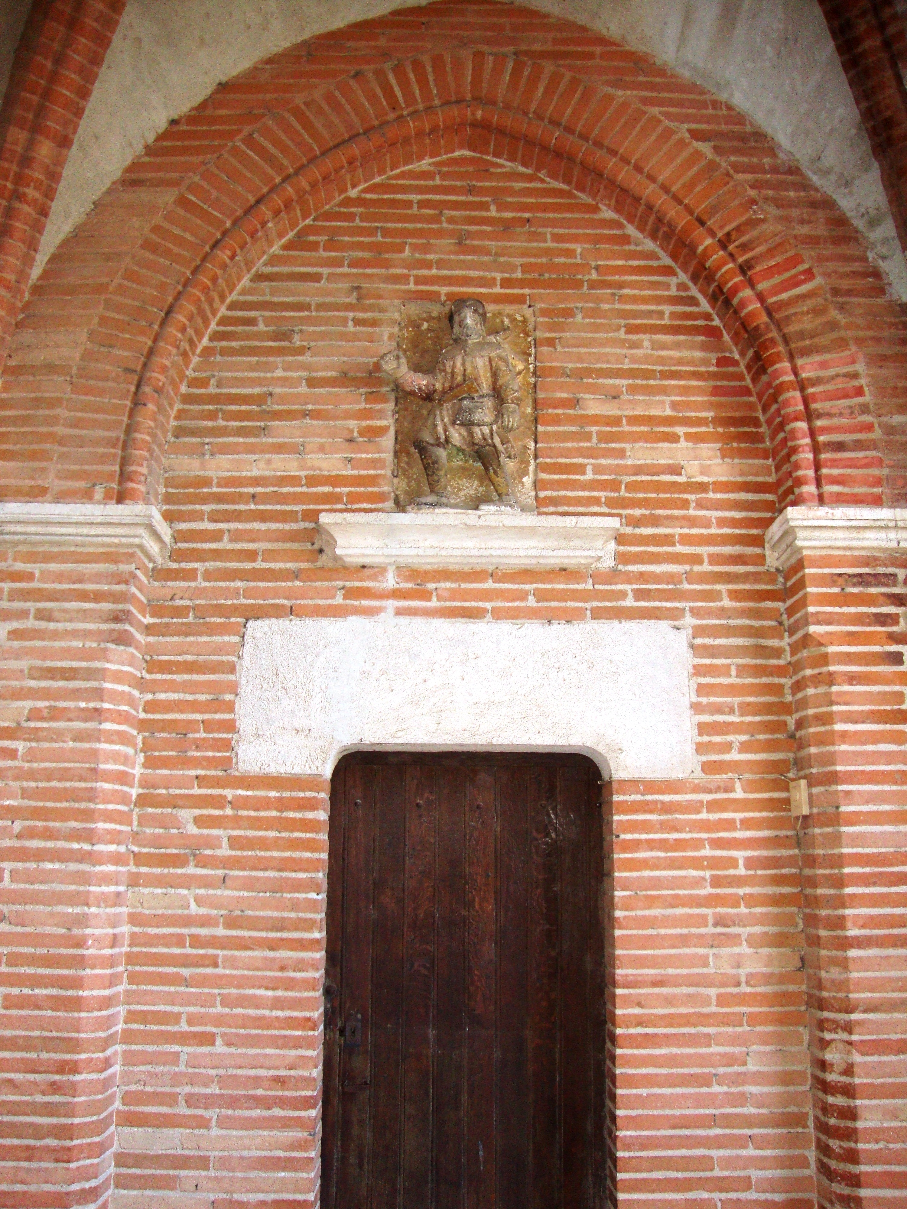 Monferran-Savès (Gers, Fr) église, entree avec statue pèlerin